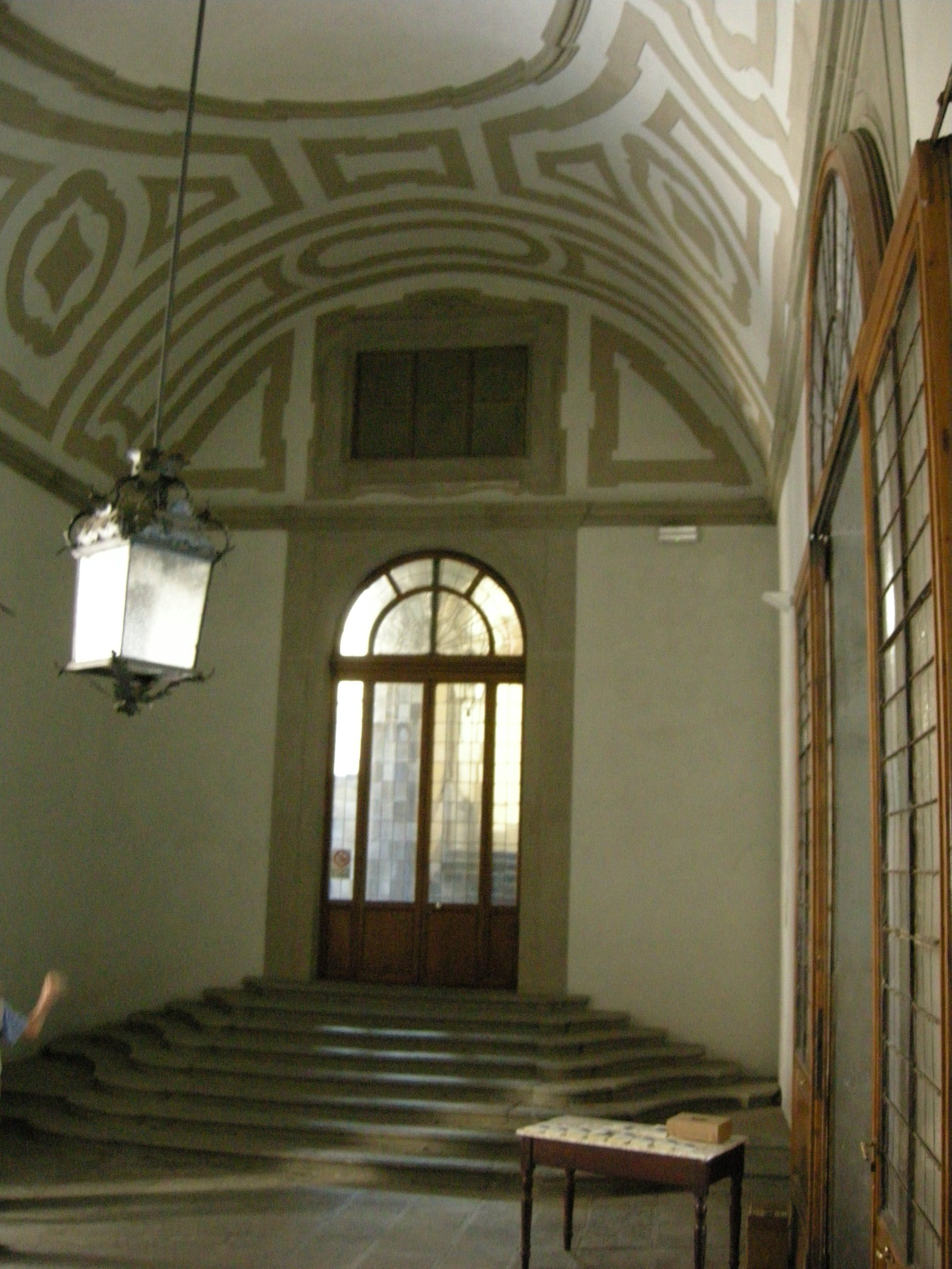 Palazzo ximenes panciatichi da sangallo, androne